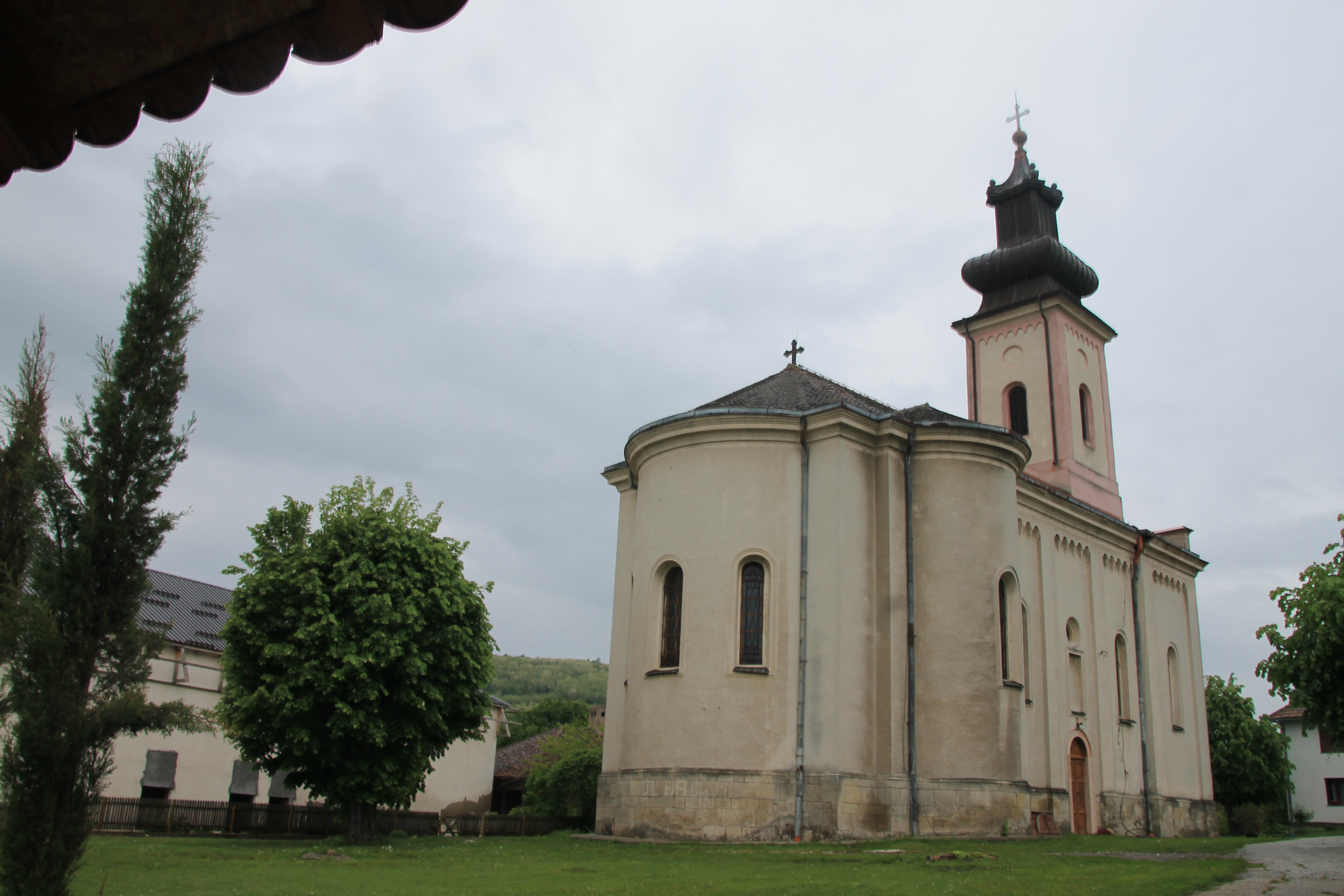 Crkva Preobraženja Gospodnjeg (Žabare)